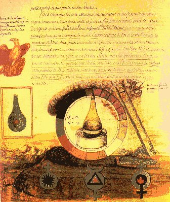 extrait de l'Alchimie de Flamel, par le Chevalier Denys Molinier "pensionnaire du Roy, amateur de la Science hermétique"